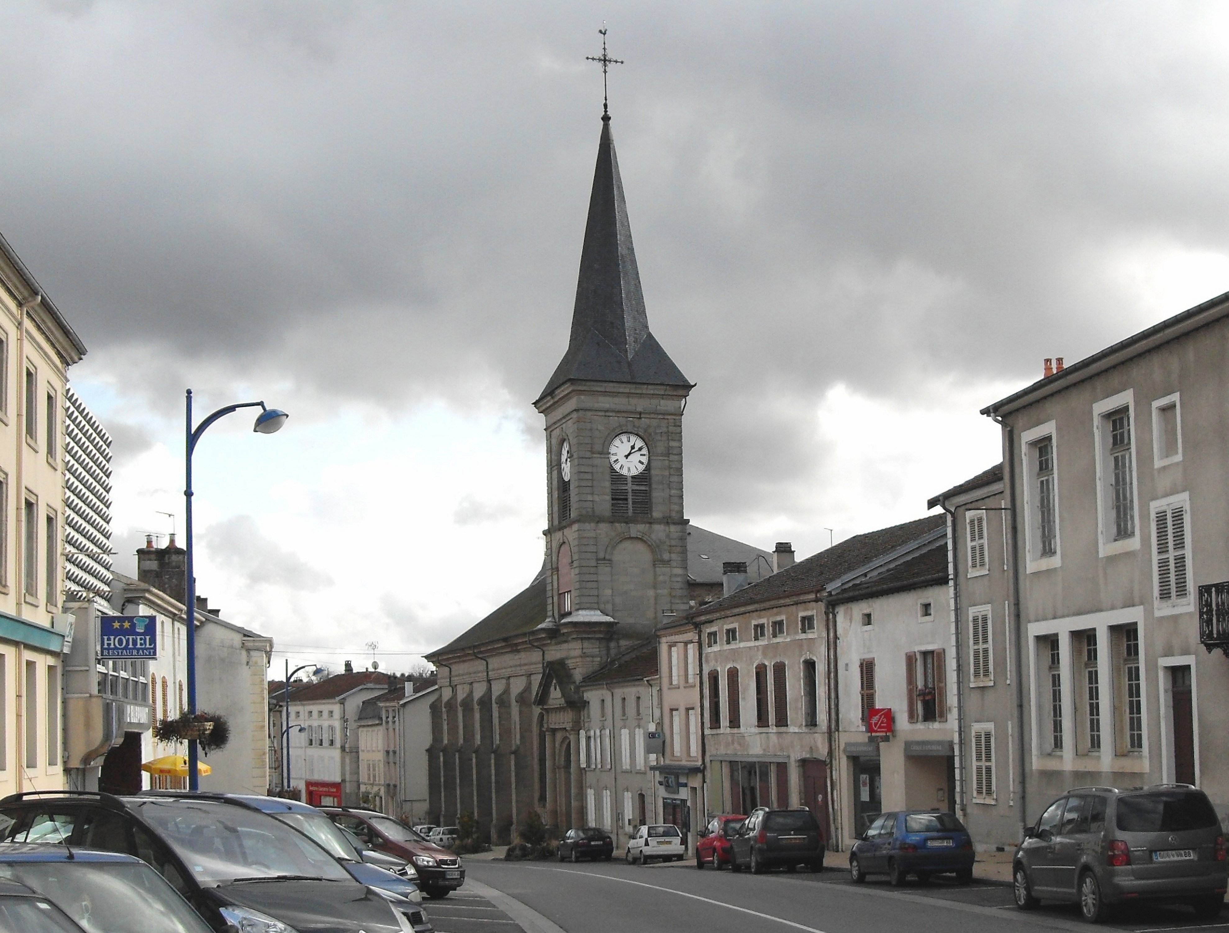 L'église Sainte-Marie-Madeleine à Darney